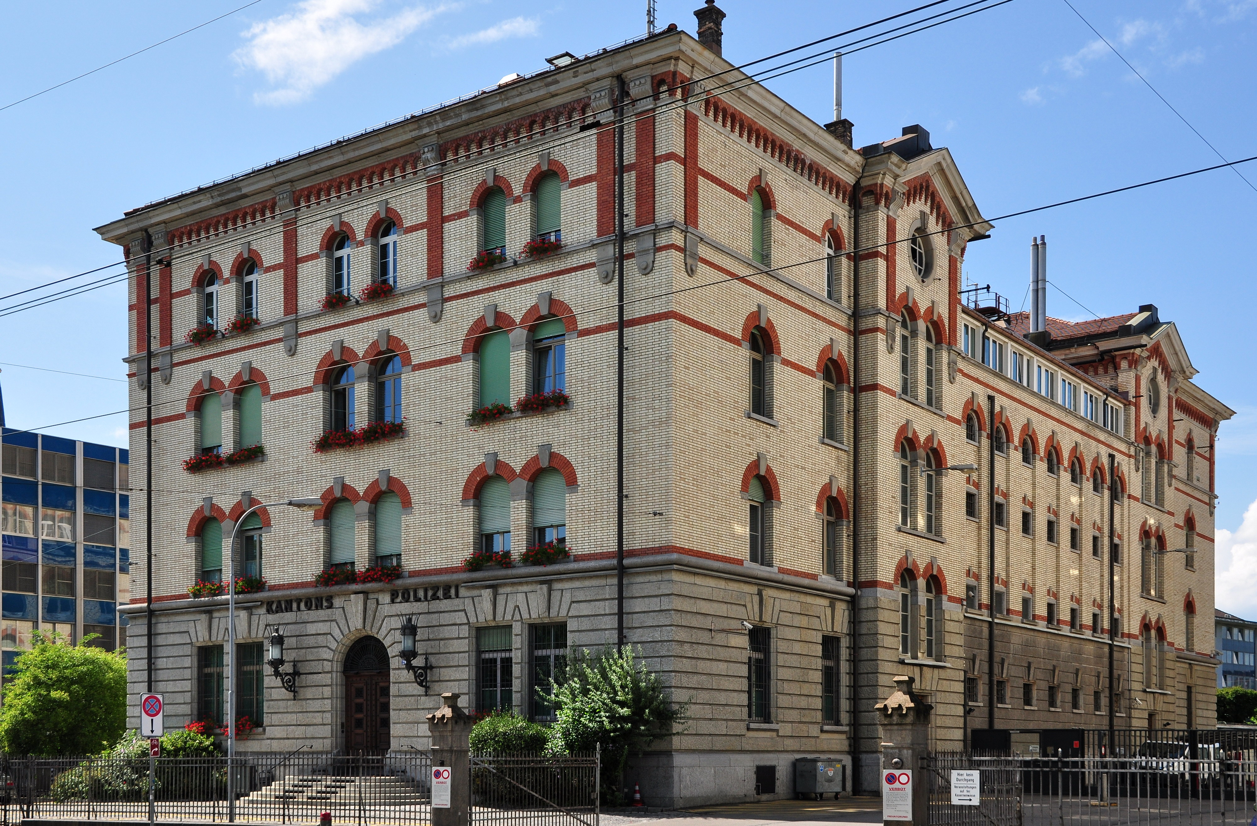 Kantonspolizei Zürich, Kaserne in Zürich- (Switzerland)